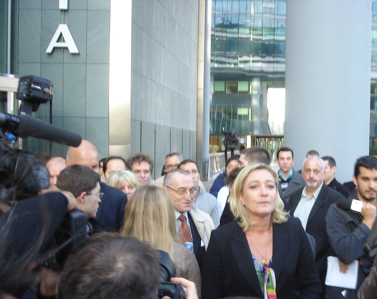 Conférence de presse de Marine Le Pen à propos de la faillite de la banque Dexia à La Défense le 17 octobre 2011